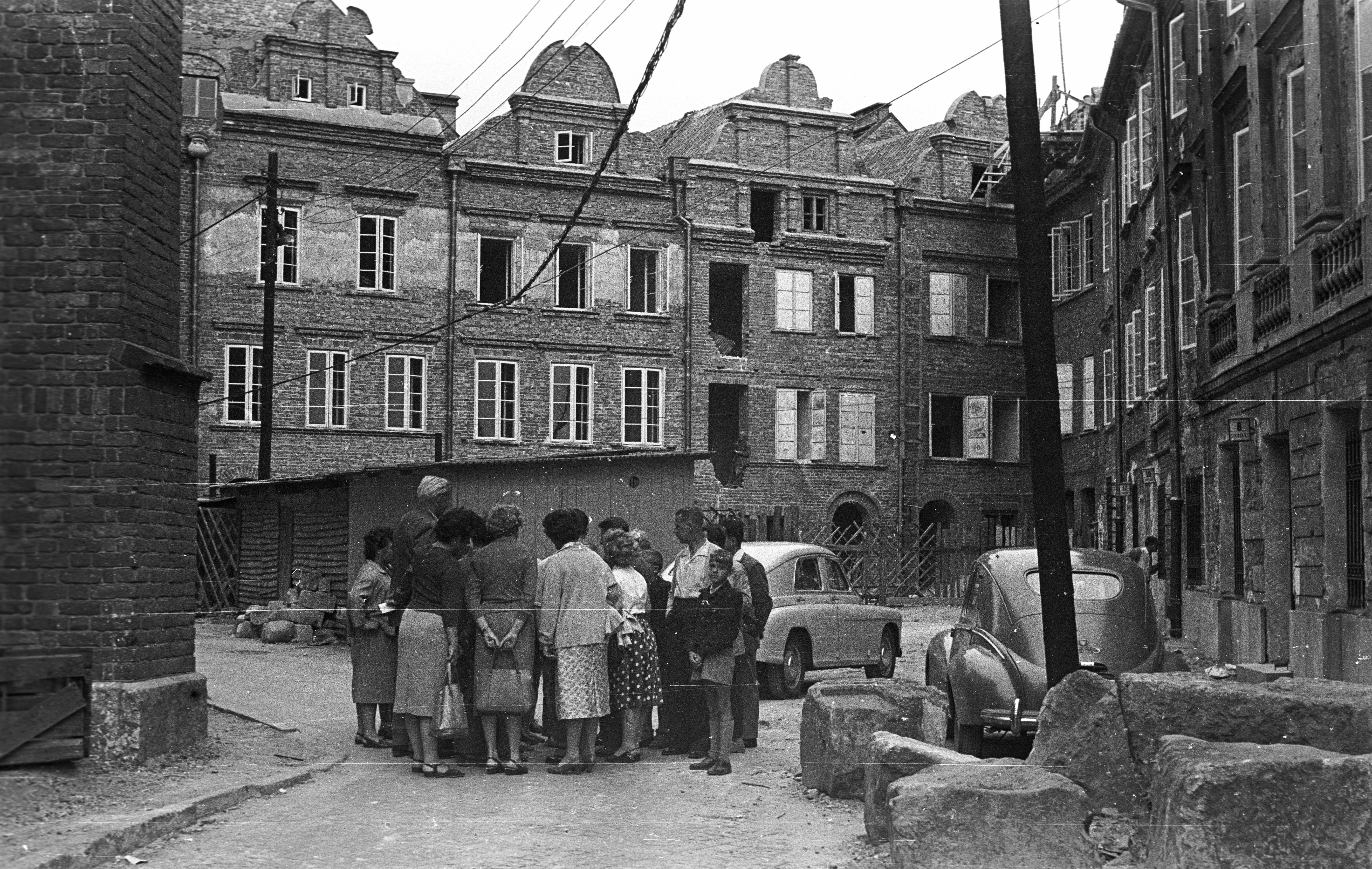 ulica Kanonia. Location: Poland, Warsaw Tags: construction Title: ulica Kanonia.